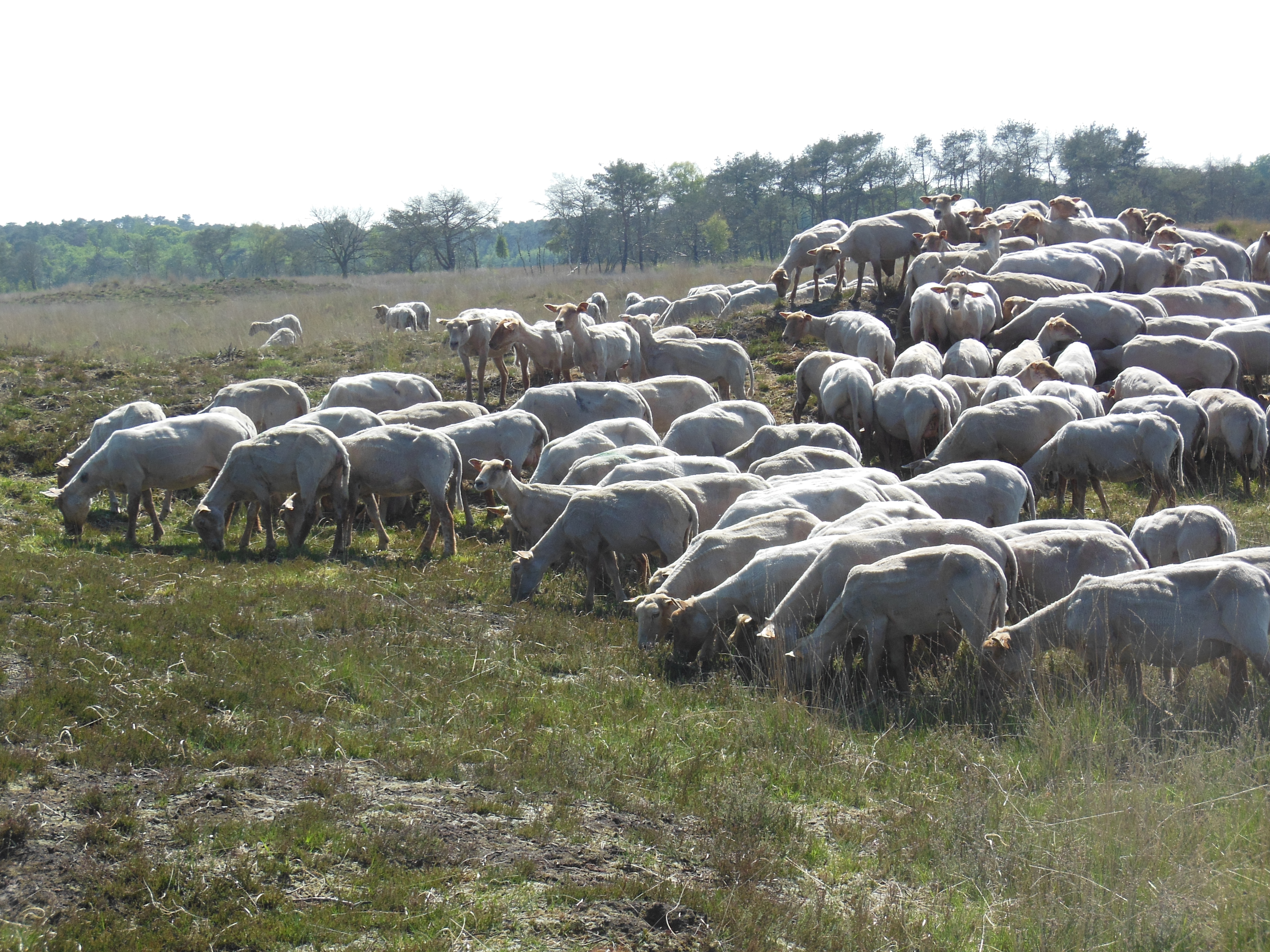 Een typisch veldkrekelbiotoop van begraasd heischraal grasland. Kalmthoutse Heide, België, 17 mei 2014